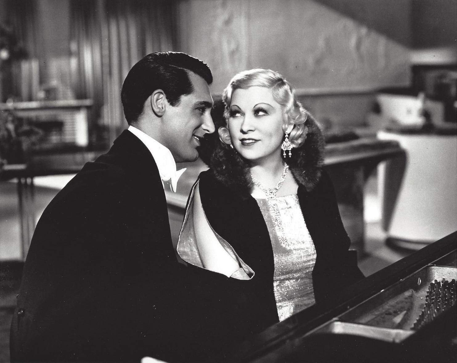 Cary Grant & Mae West taken for film I'm No Angel (1933). See also film still. No copyright notice.